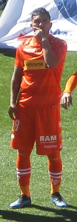 Jugador de fútbol Ignacio Jara en Cobreloa en el año 2018